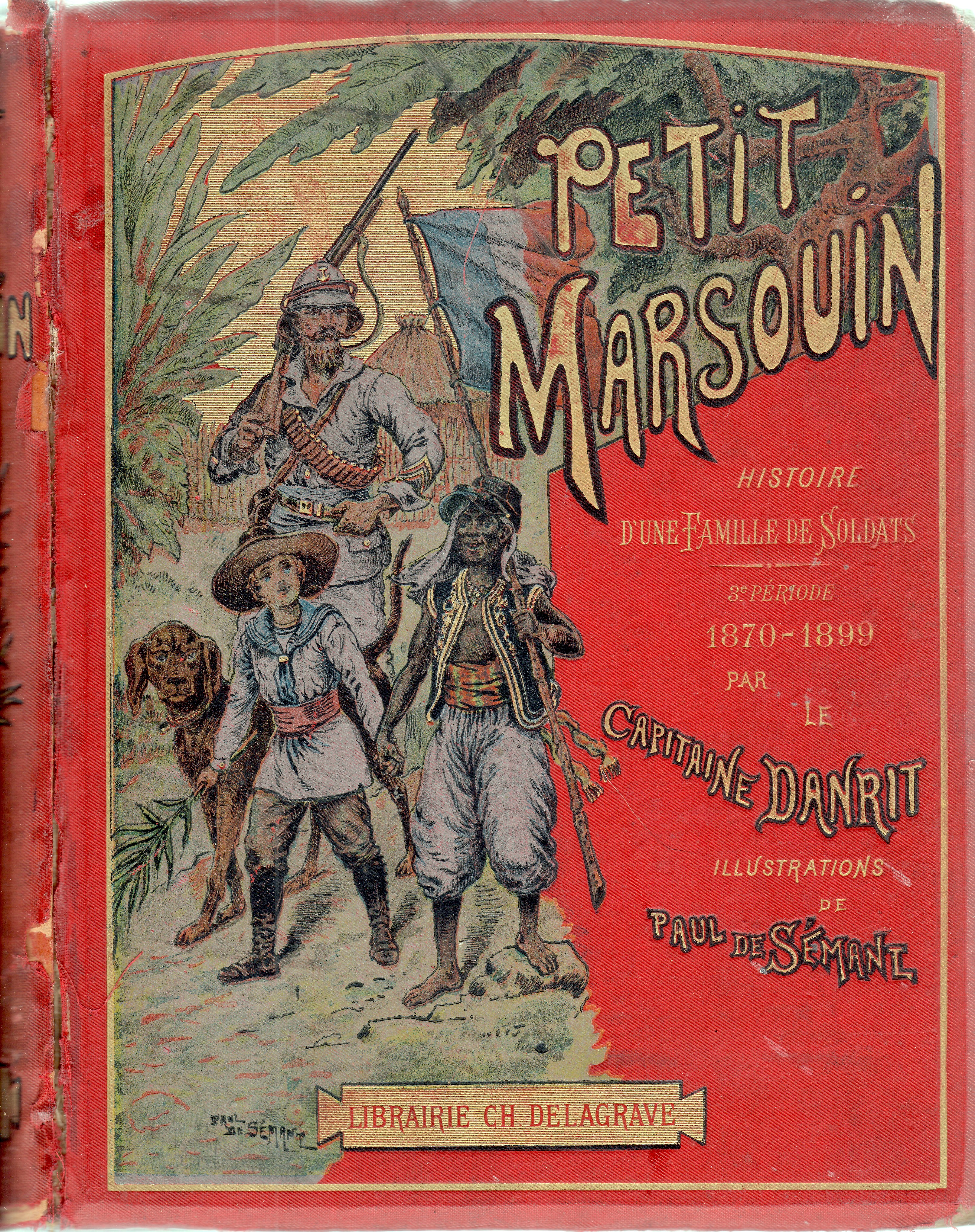 Couverture du Petit Marsouin, roman du capitaine Danrit, 3ème tome de la série intitulée "Histoire d'une famille de soldats", 3me période : 1870-1899